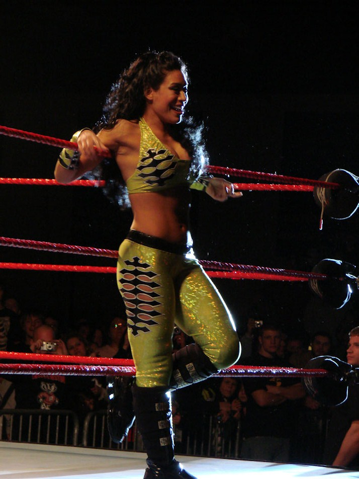 luchadora melina